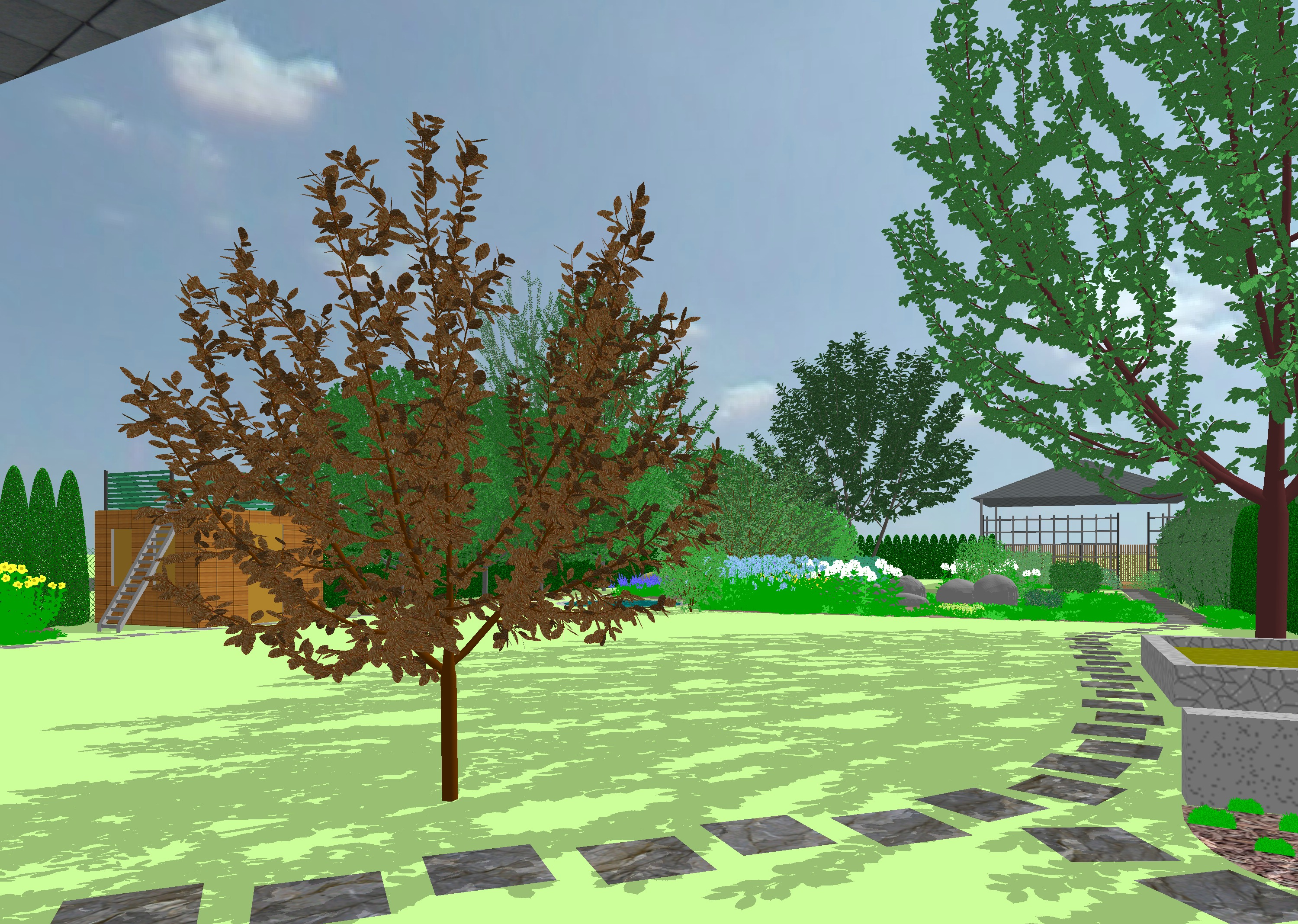 Sadovnická projekce je CAD software původně vyvíjený v ČR původně pro DOS Karlem Rysem ve spolupráci s Českou zahradnickou akademií Mělník.